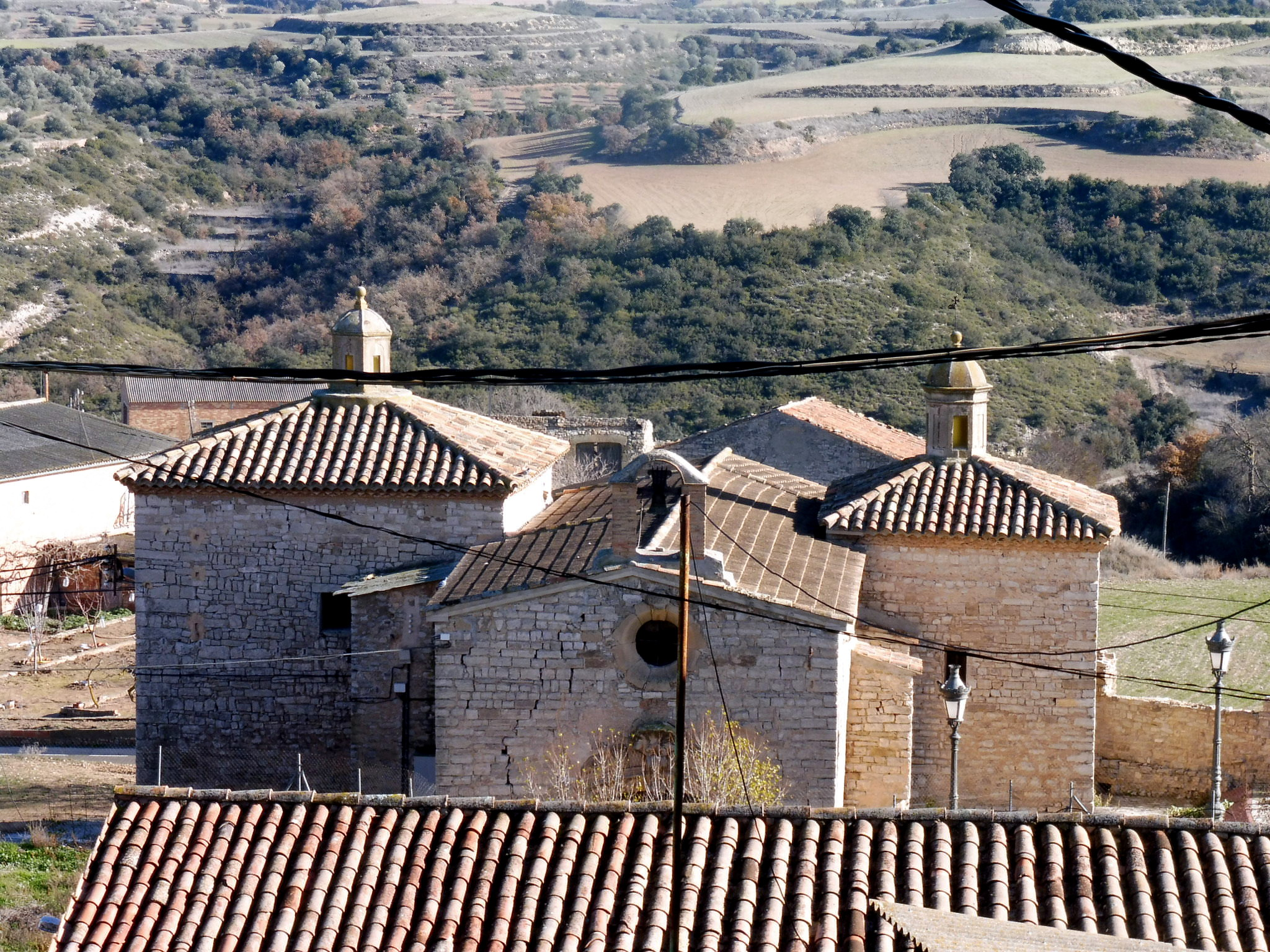 Església parroquial de Sant Salvador (Granyanella)